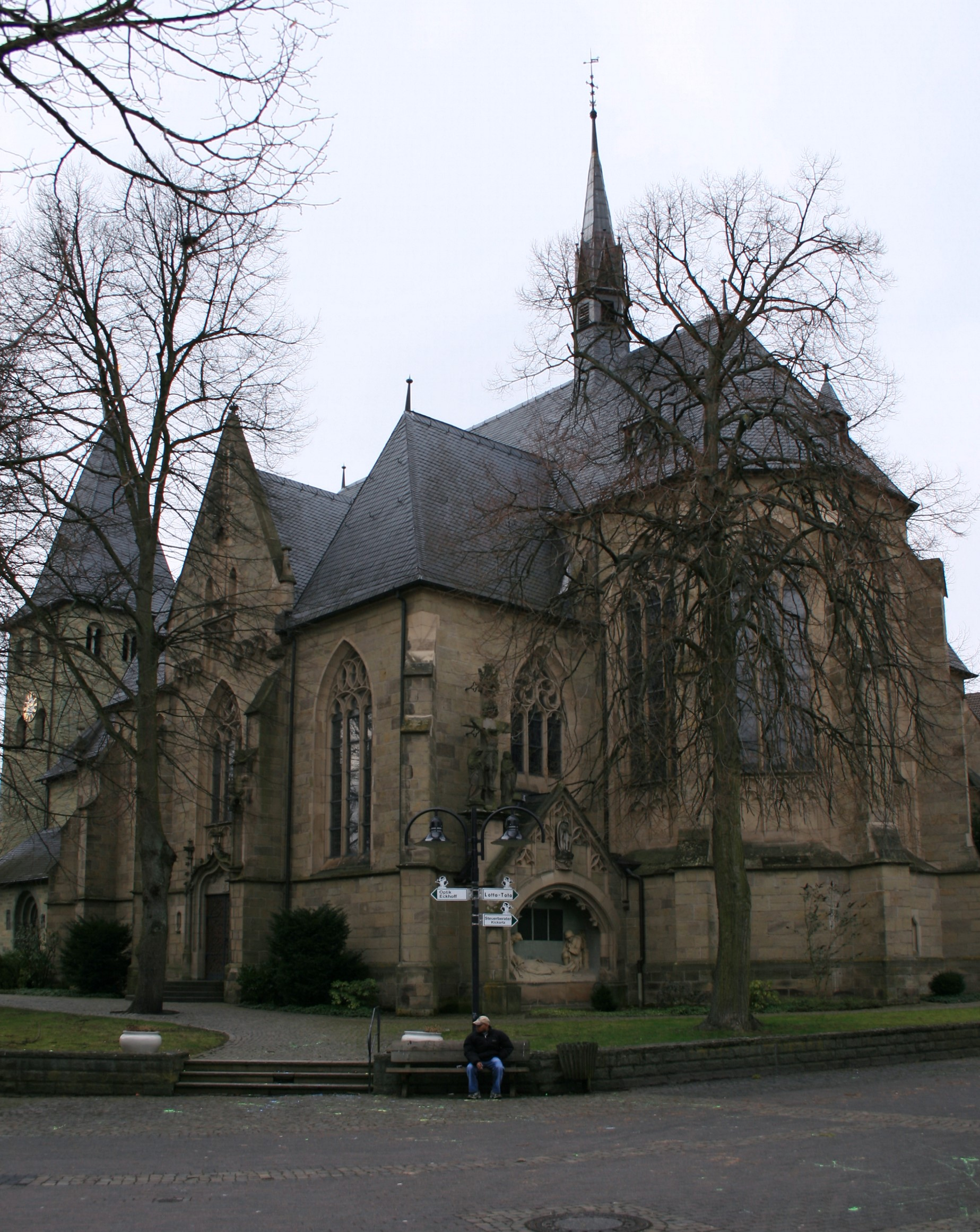 Katholische Pfarrkirche St. Lambertus in Bremen (Ense), Gemeinde Ense.